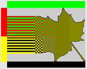 Punainen ei ole vihreän värin vastakohta: Punavihreät värit ovat itseasiassa keltaisia värejä